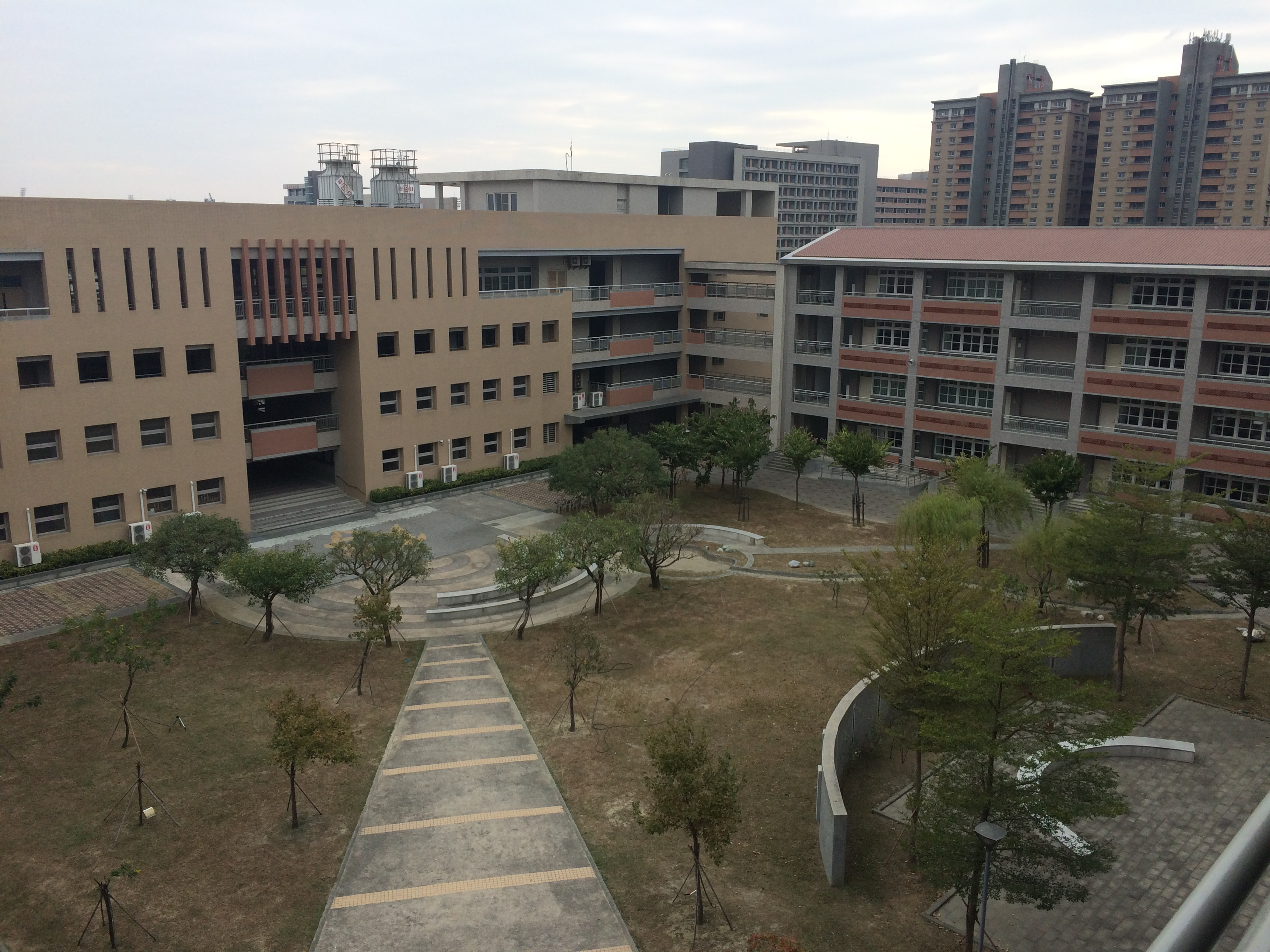 中華民國嘉義縣永慶高級中學從五樓拍下的中庭俯瞰照片。